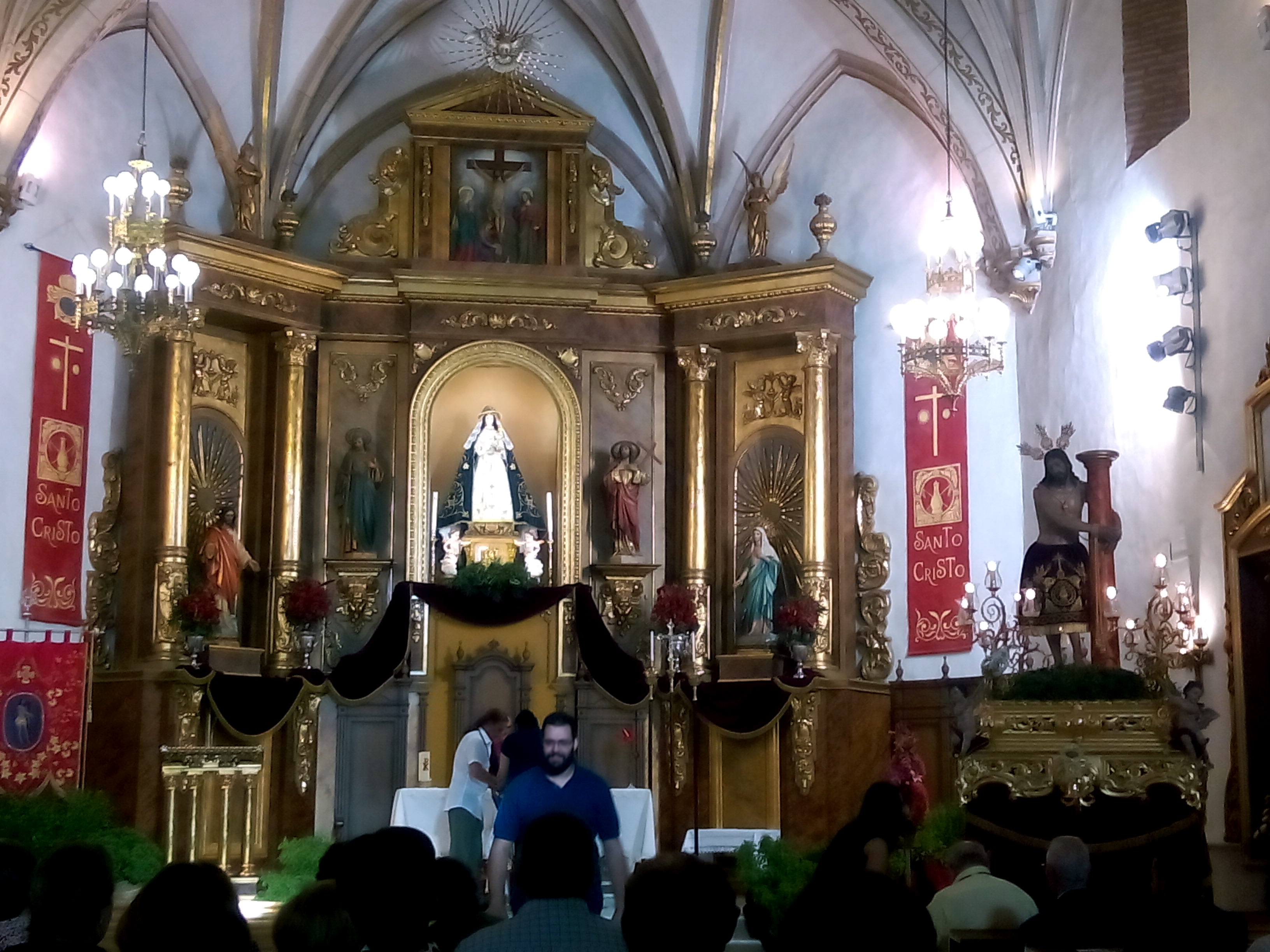 La iglesia fue construida sobre una más pequeña llamada de Santiago "Fratar Domini" y fue bendecida junto al cementerio anexo y tres campanas el 1 de febrero del año 1603.